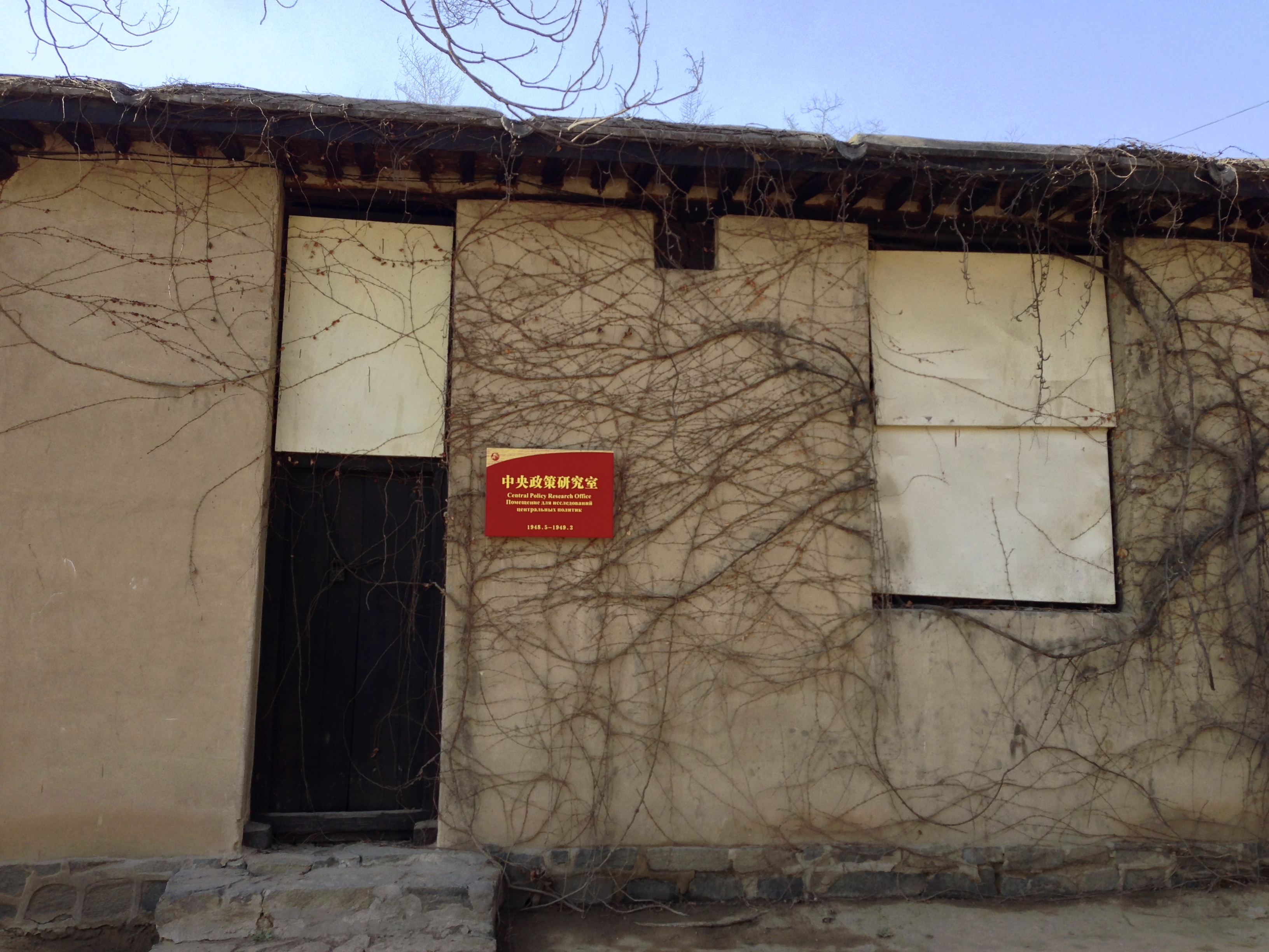 Pingshan, Shijiazhuang, Hebei, China